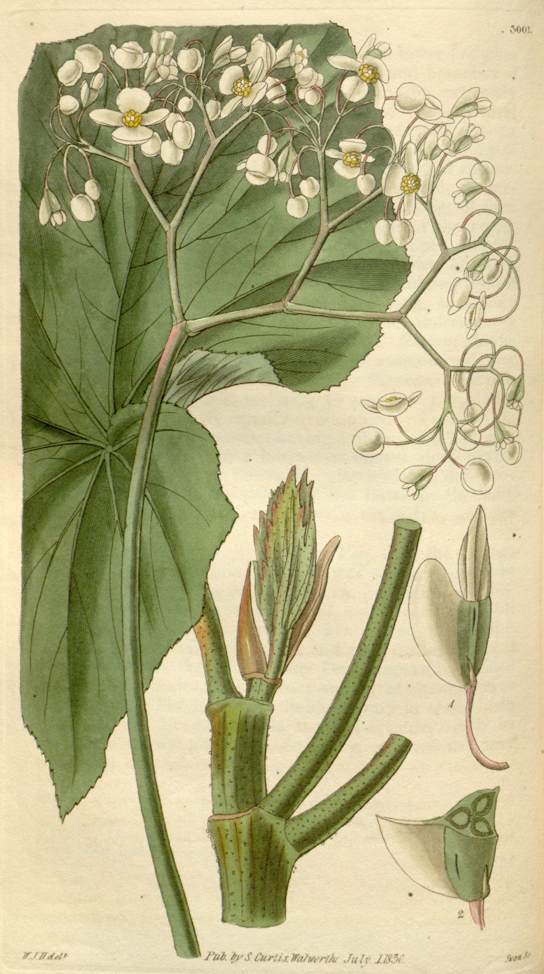 Begonia reniformis (as B. longipes)